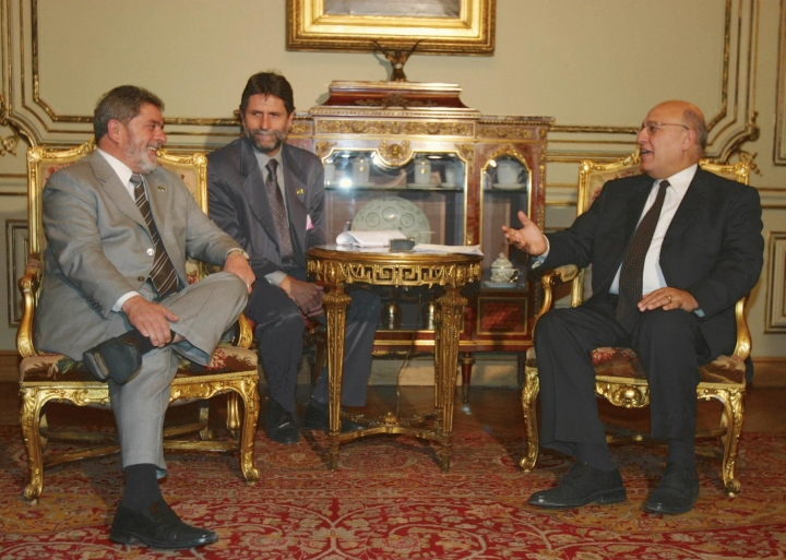 Cairo (Egito) - O ministro das Relações Exteriores da Autoridade Nacional Palestina, Nabil Shaath, recebe o presidente Luiz Inácio Lula da Silva no palácio Kouba. (Foto: Antonio Milena - ABr - hor.25)